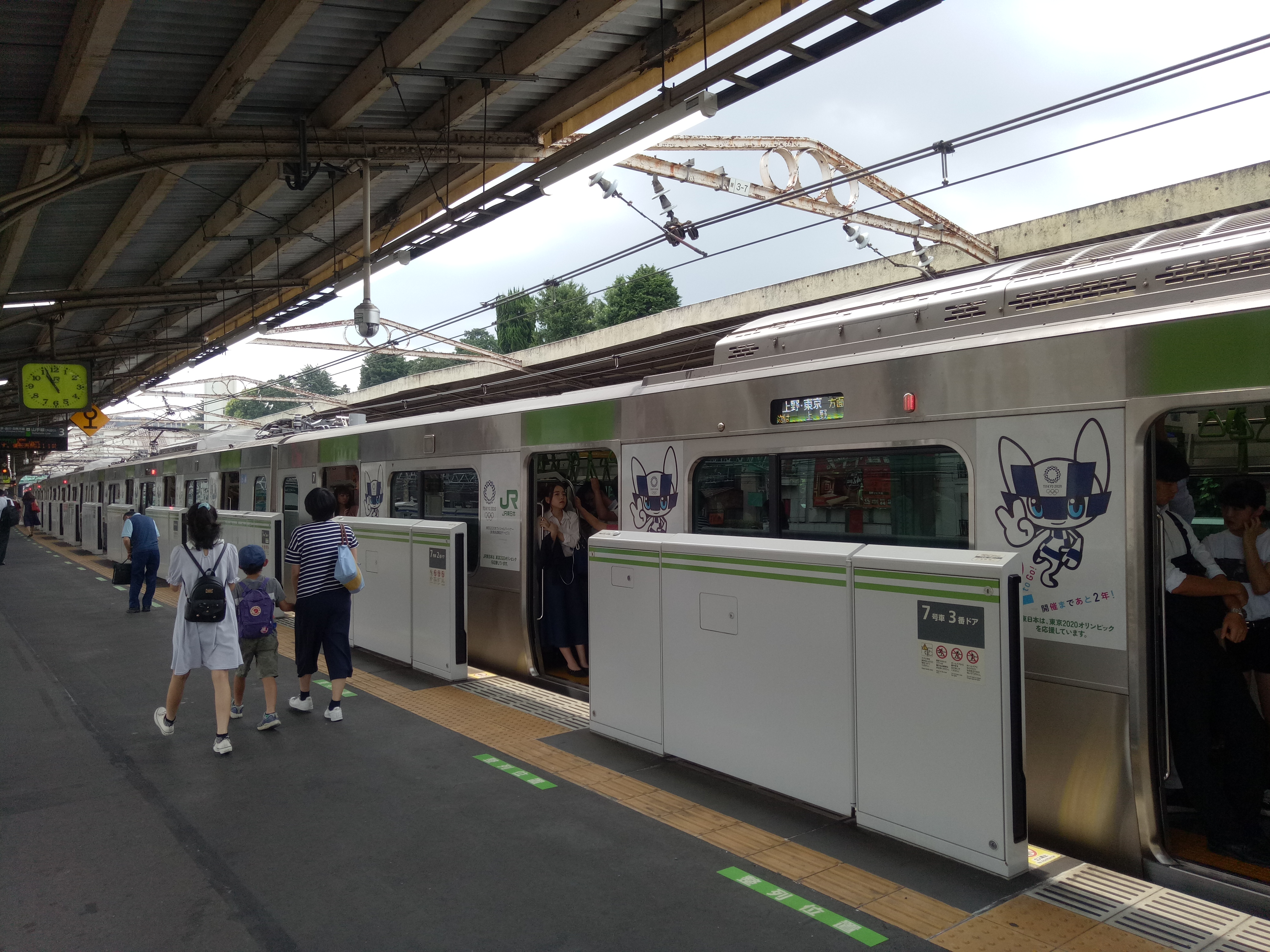 JR東日本E235系電聯車停靠於鶯谷站